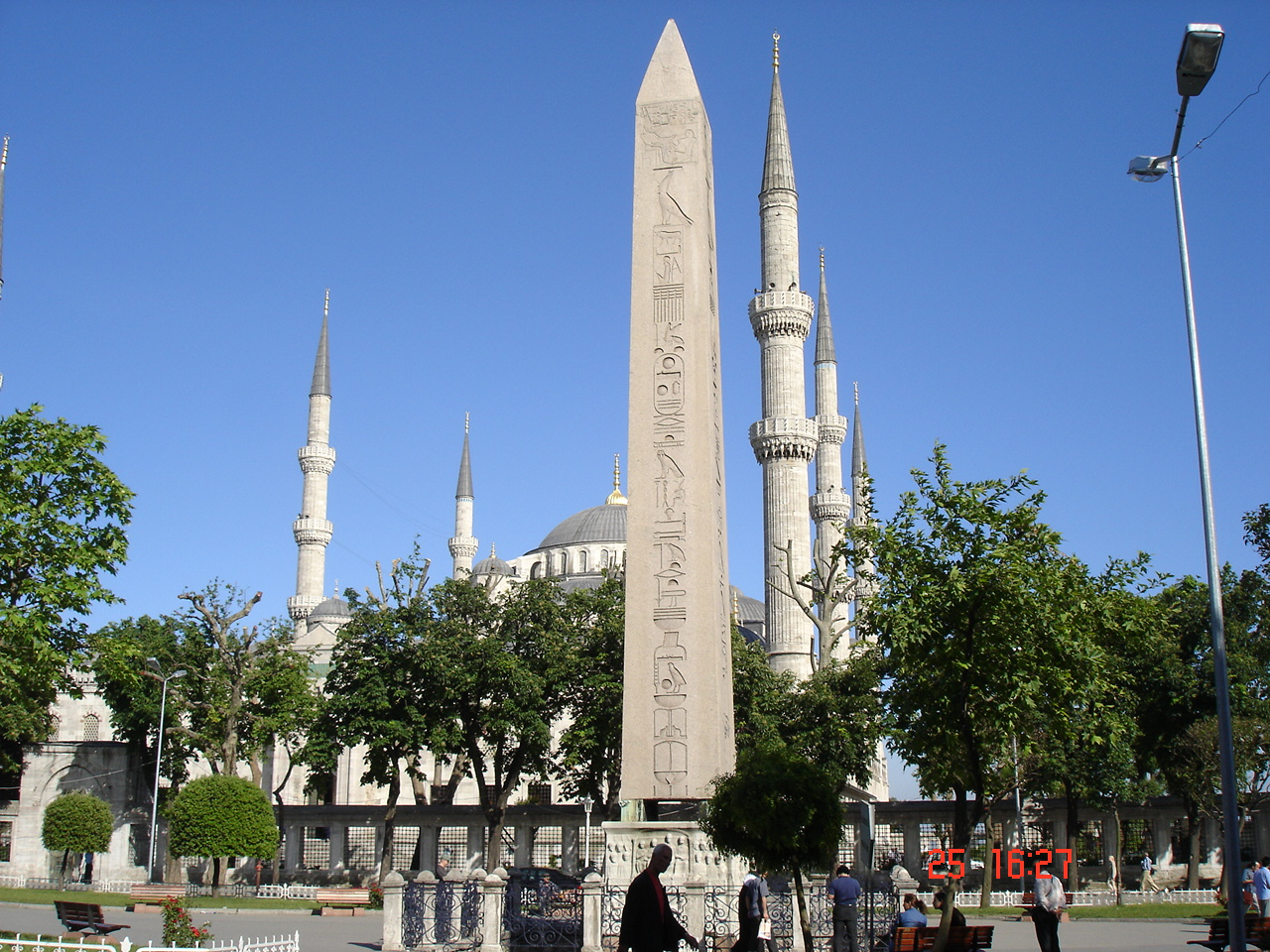 Istanbul: l'obelisco cosiddetto "di Teodosio" (in realtà antico egizio, eretto in origine da Tutmosi III) che fungeva da meta nell'immenso ippodromo costruito dagli imperatori romani e bizantini. Fu eretto nel 390 d.C. Sullo sfondo i minareti della Grande Moschea di Solimano il Magnfico. Foto di: Giovanni Dall'Orto, 25-5-2006.